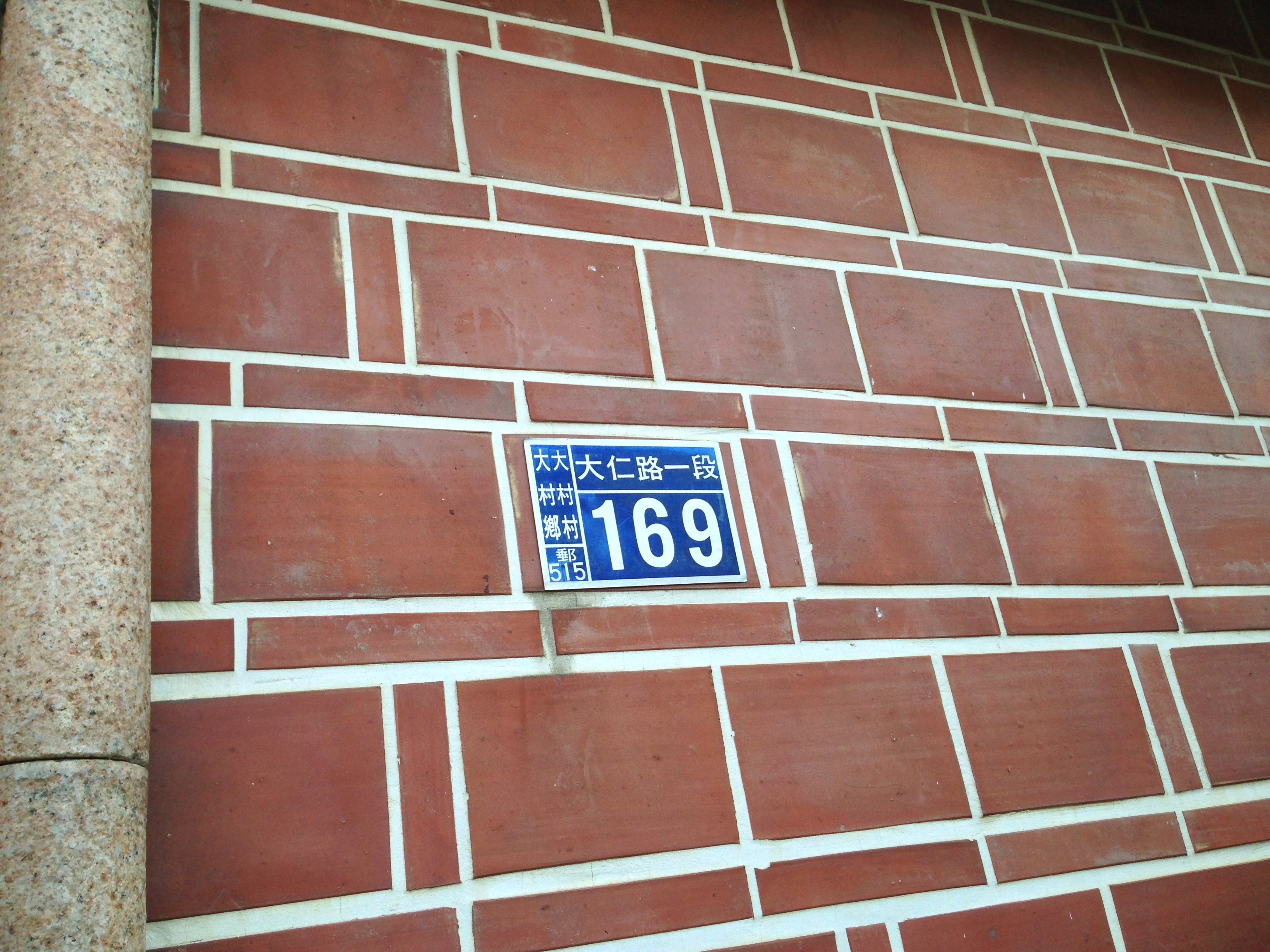 中文（台灣）: 大庄慈雲寺門牌